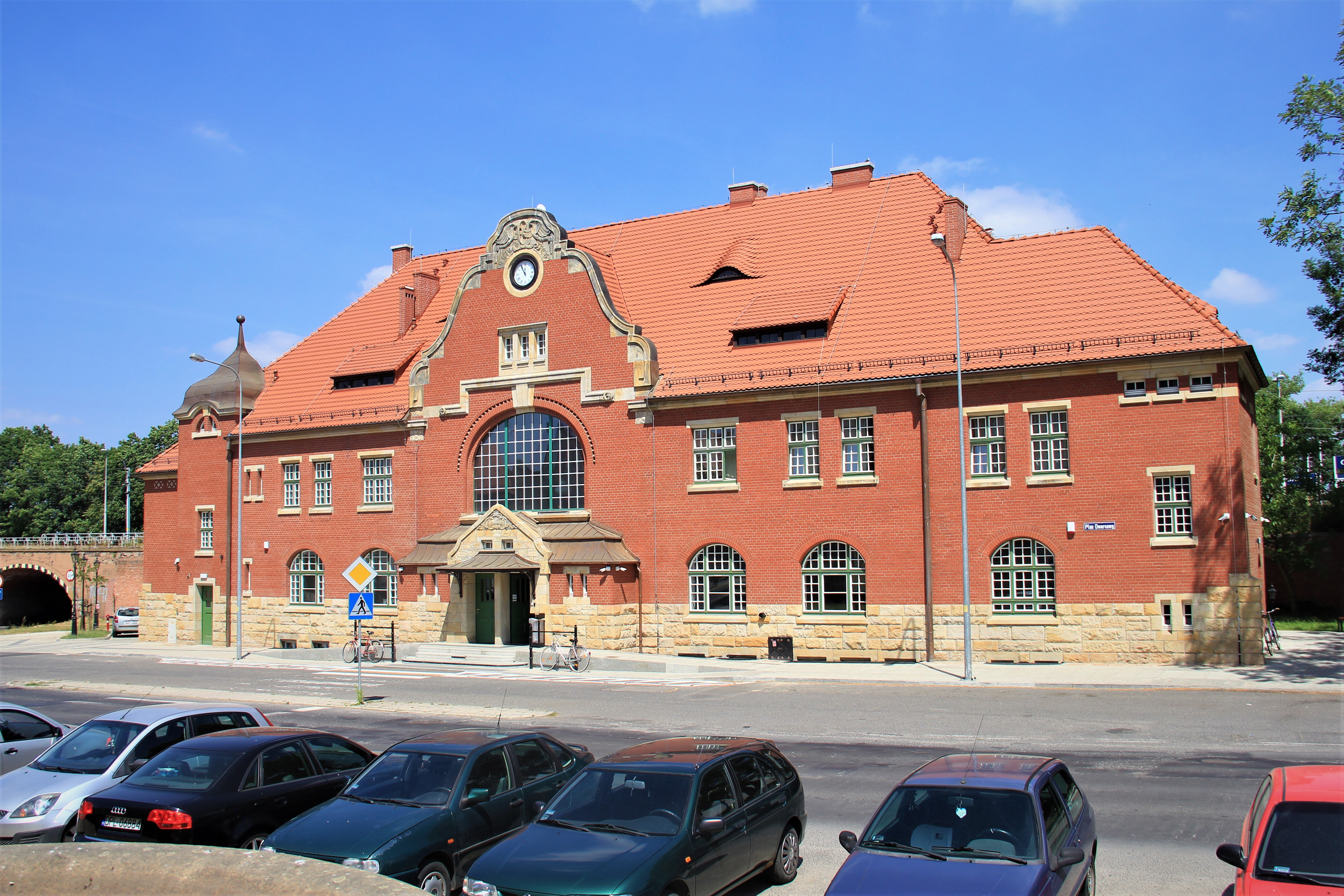 Budynek dworca kolejowego w Chojnowie. Widok od strony miasta.